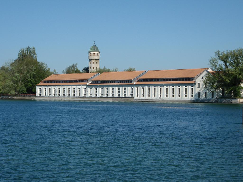 Bleiche und Wasserturm der ehemaligen Industriesiedlung „Stromeyersdorf“ in Konstanz.Zwischen 1905 und 1912 nach Plänen von Philipp Jacob Manz für das Konstanzer Textilunternehmen Stromeyer errichtet.